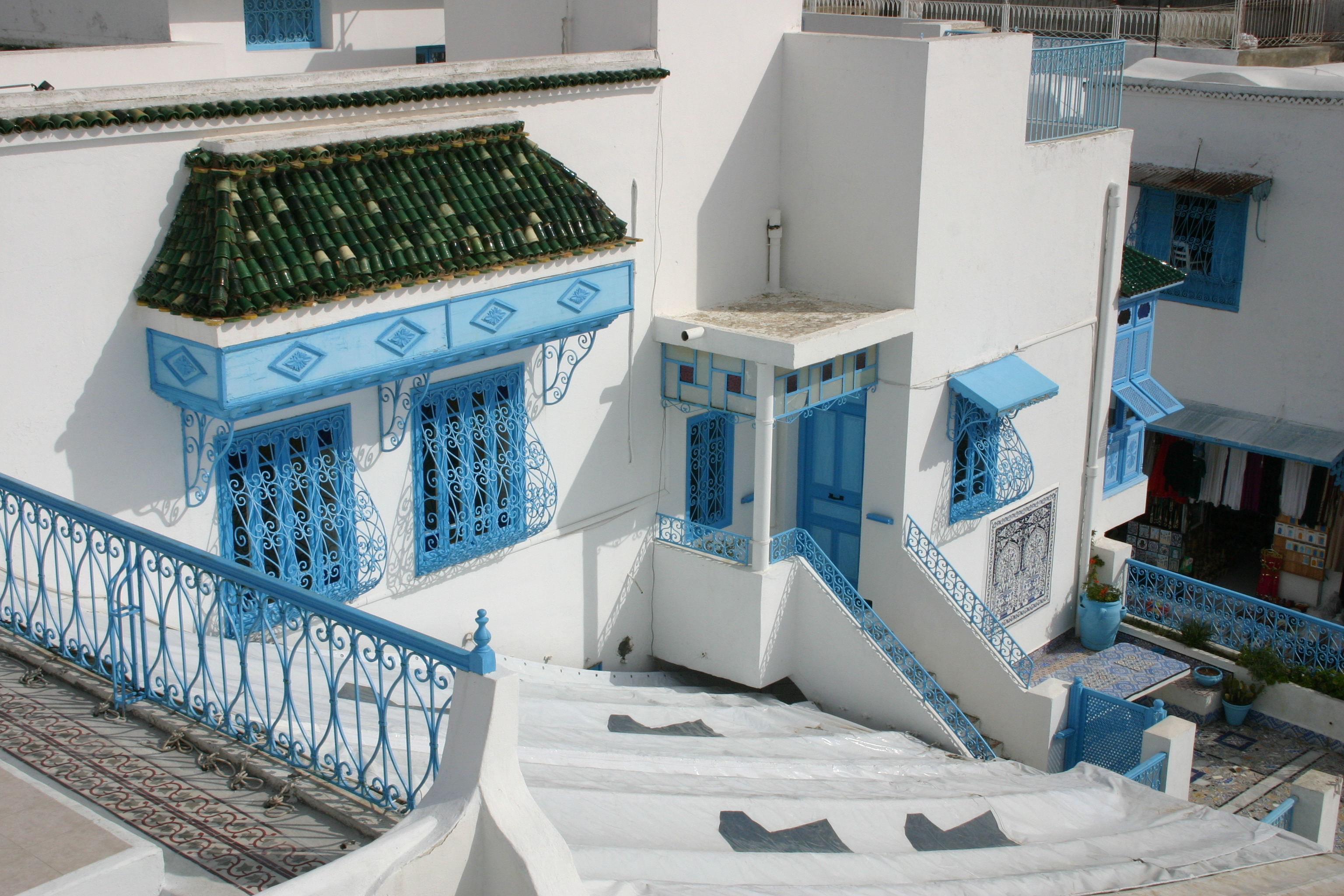 Interesting building at Sidi Bou Said, Tunisia